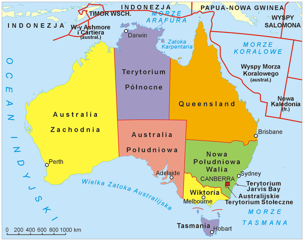 Mapa administracyjna Australii. Autor: Aotearoa